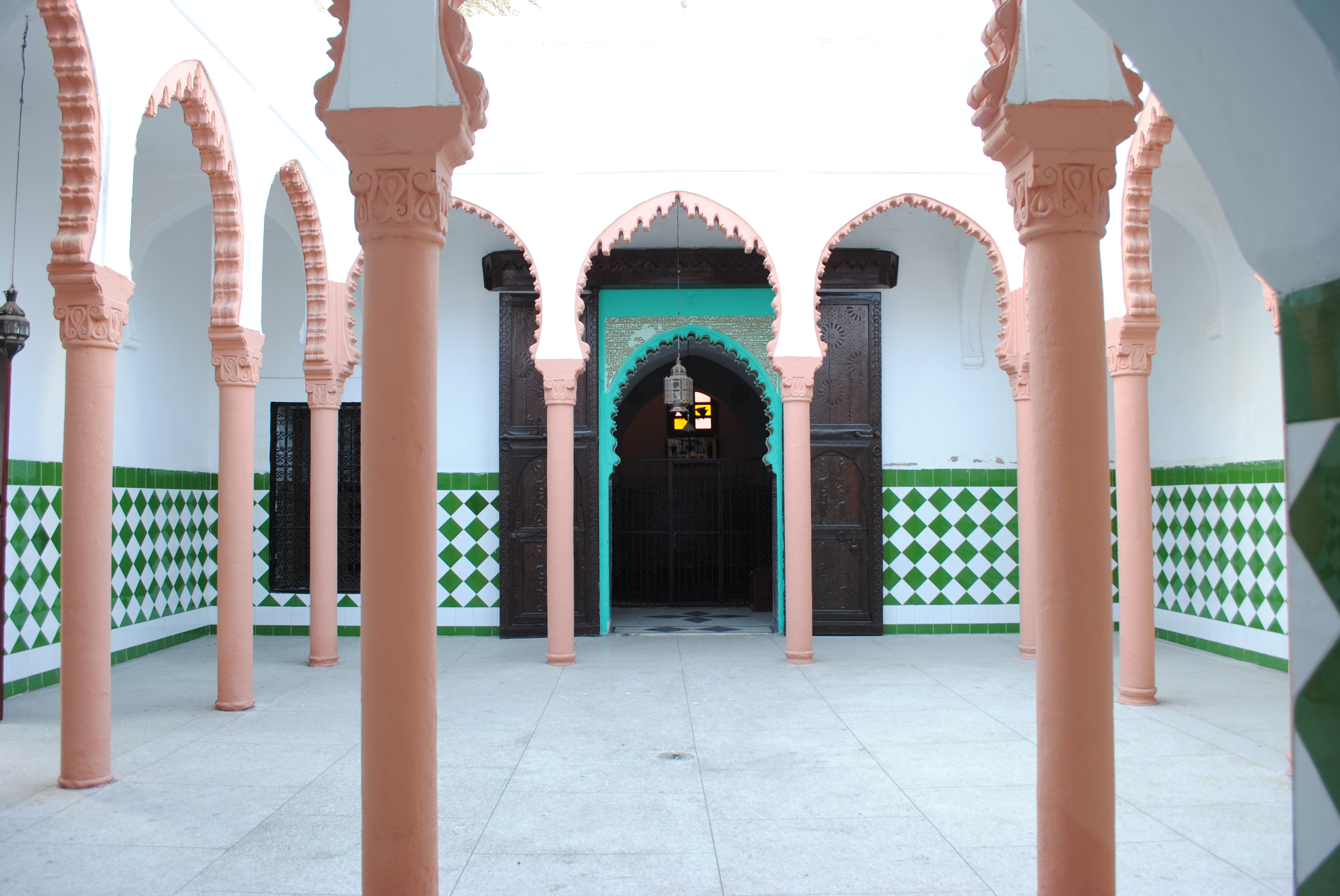 Mausolée Sidi Belyout